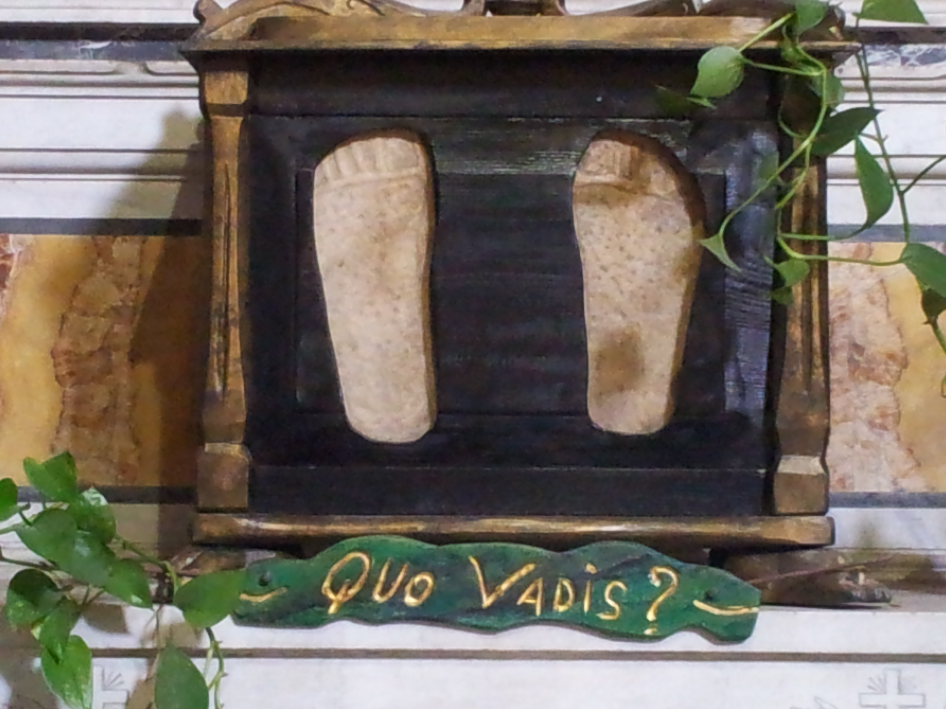 שלט קוו ואדיס בכנסיית סבסטיאנוס הקדוש